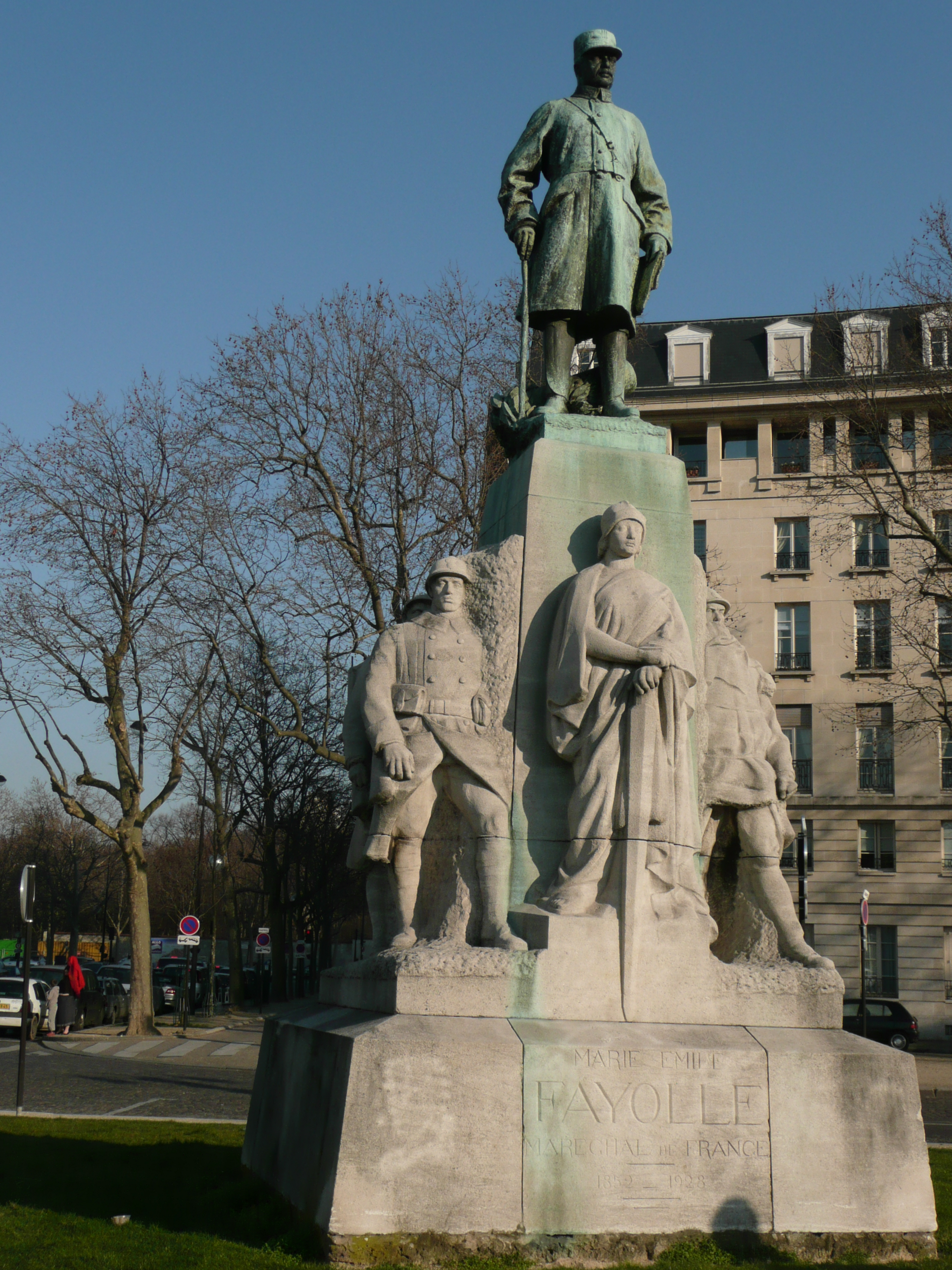 Statue du maréchal Fayolle Place Vauban à Paris (VIIe).